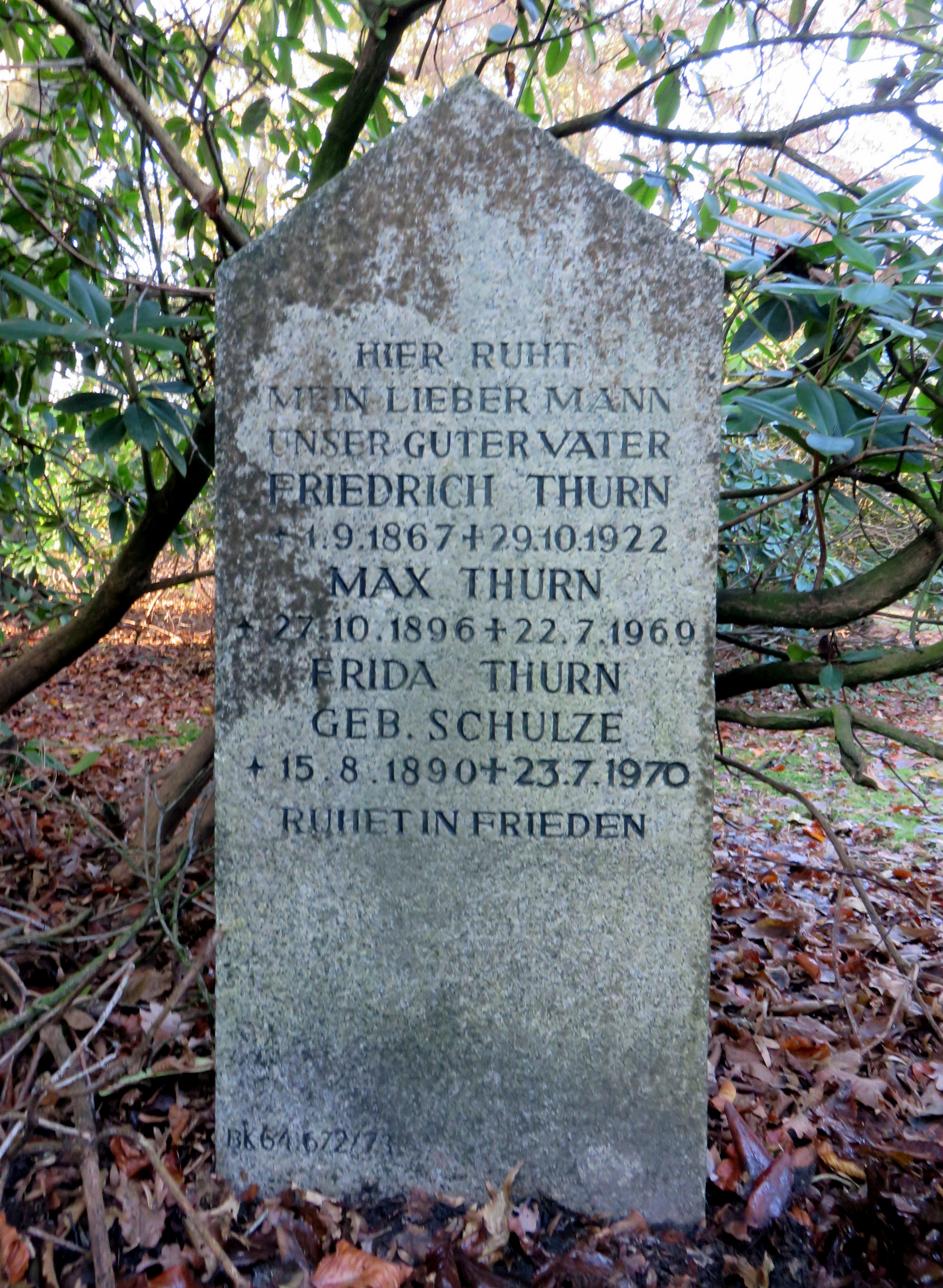 Grab des deutschen Dirigenten Max Thurn, Friedhof Ohlsdorf, Planquadrat BK 64 (südöstlich Kapelle 12).